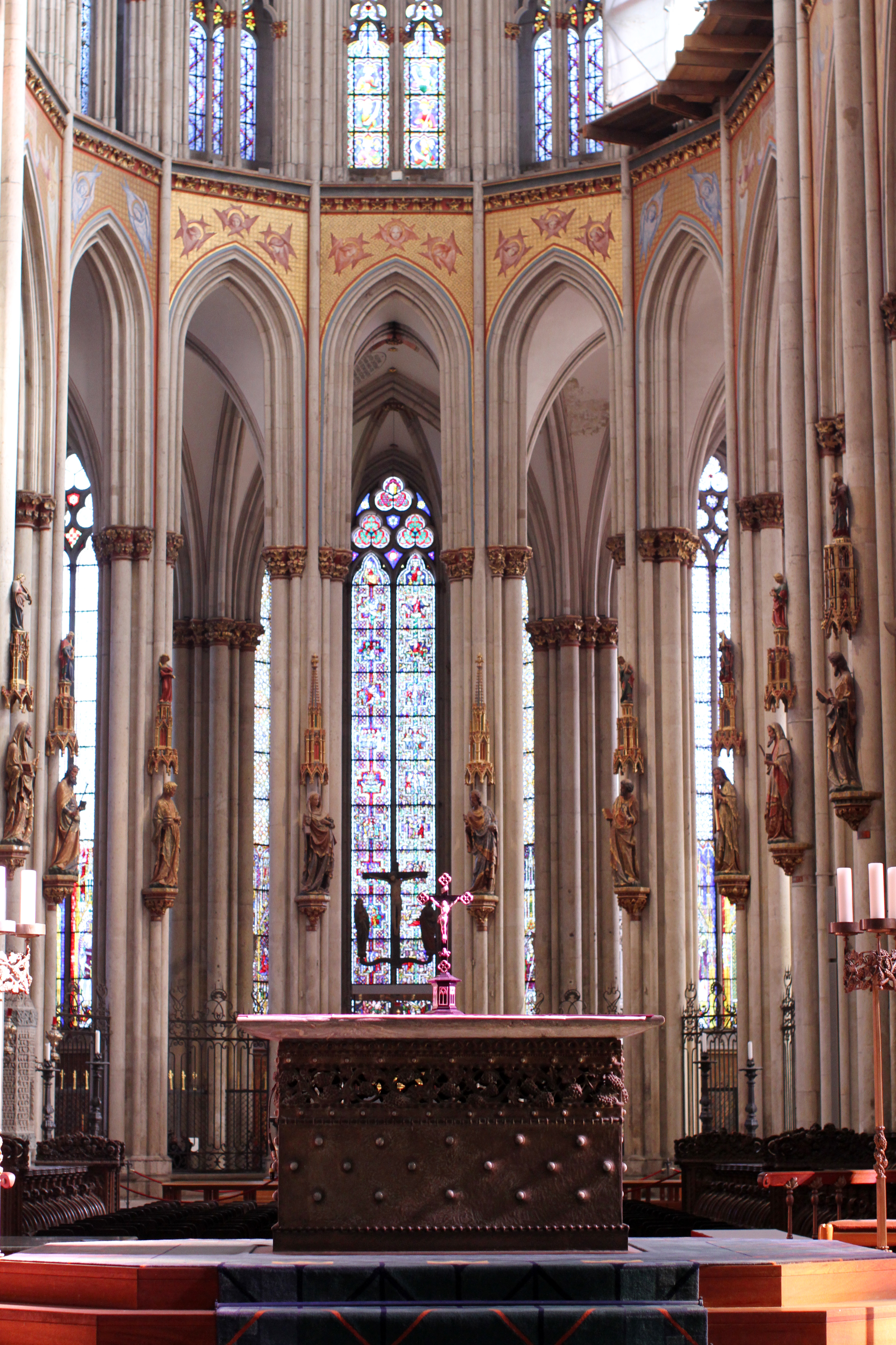 Dom zu Köln, Chorbereich